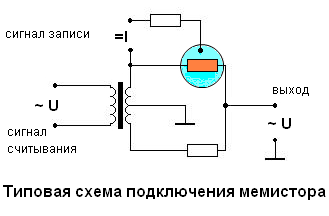 Типовая схема подключения мемистора